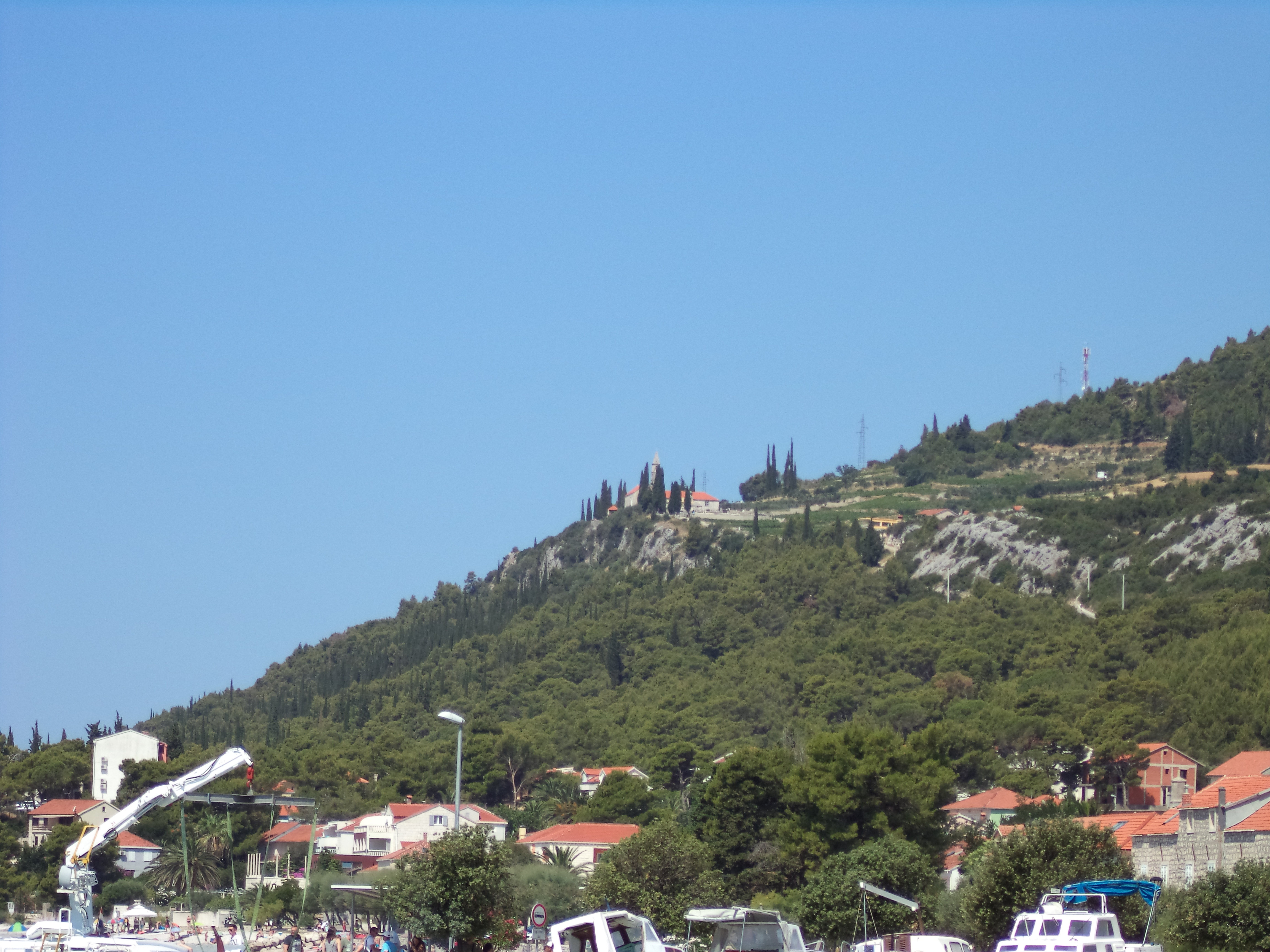 Podggorje